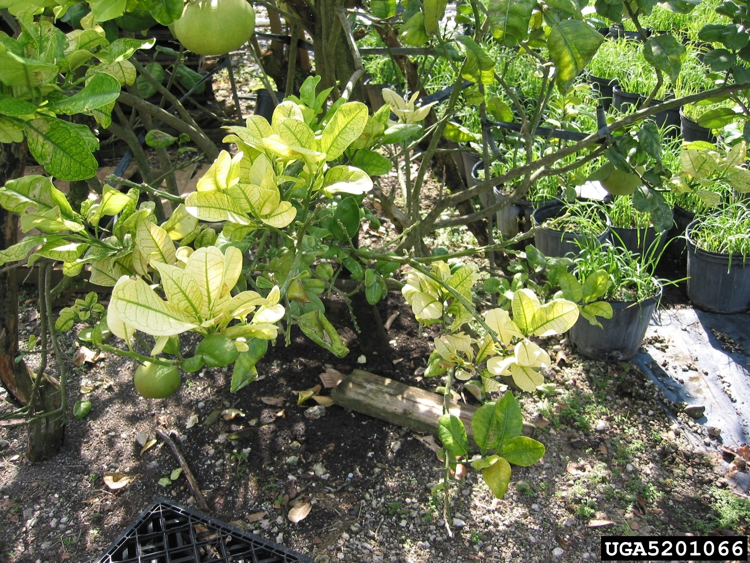 Symptômes de la maladie du dragon jaune due à Candidatus Liberibacter asiaticus sur pamplemoussier (Citrus maxima).